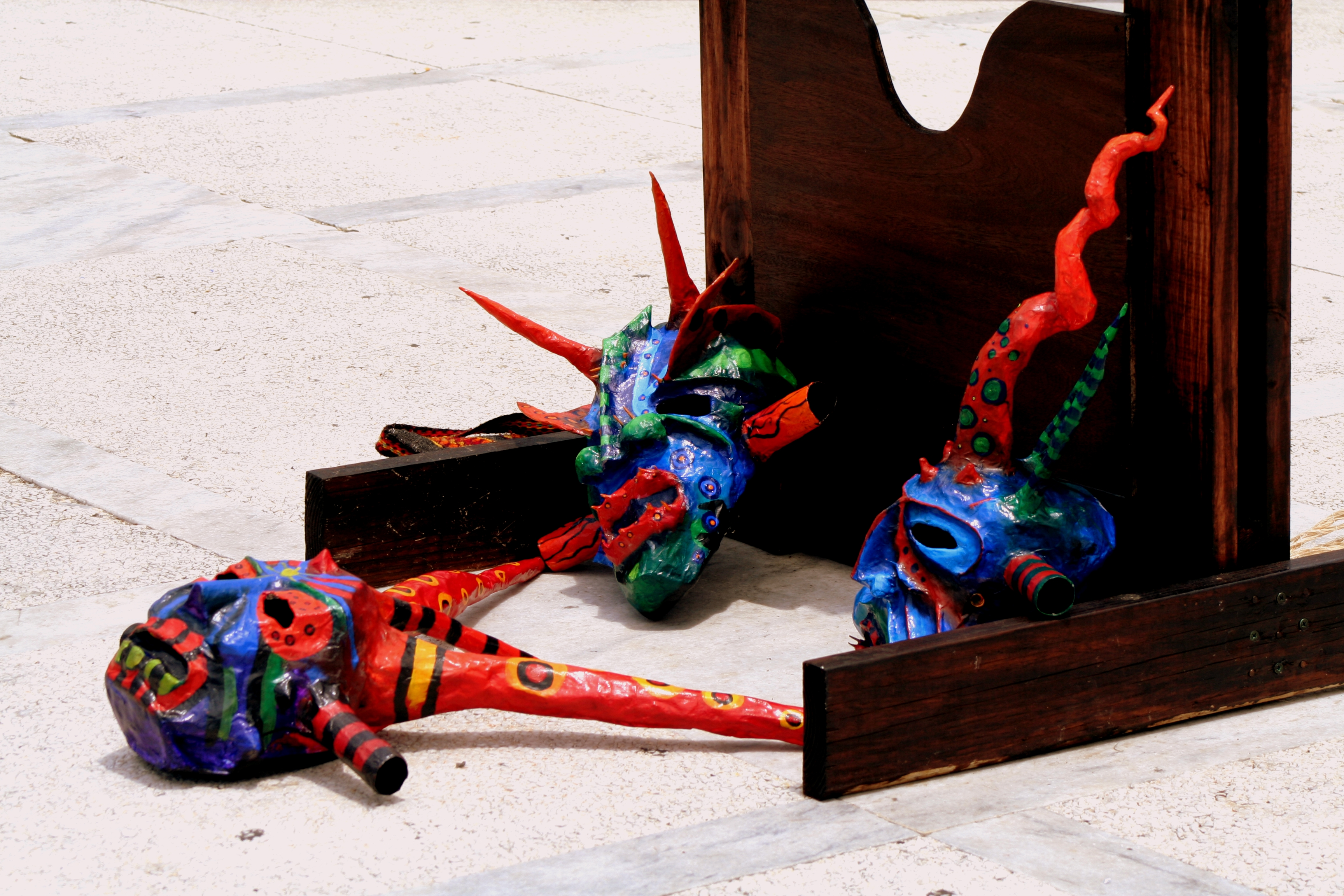 Cabezas de vejigantes